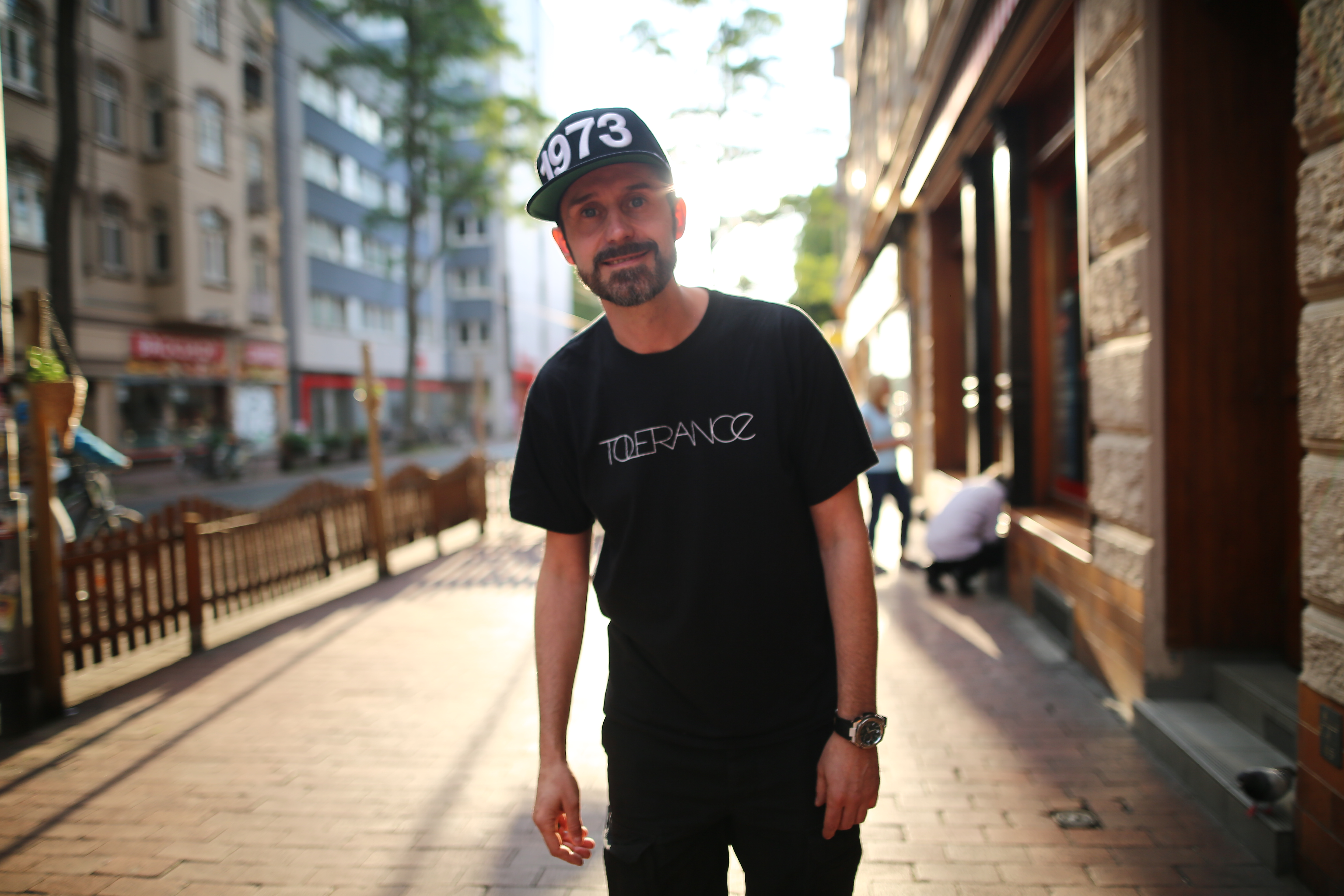 Pressefoto